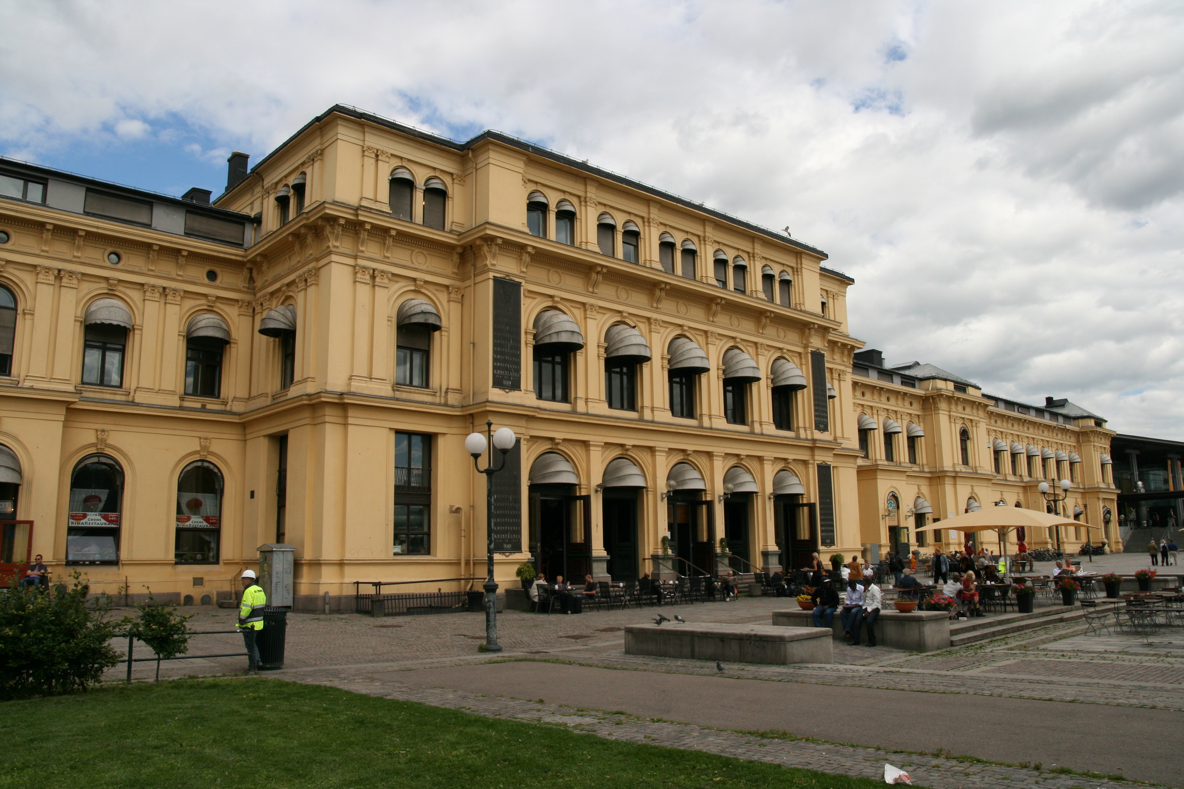 Østbanen i Oslo, sjøsiden